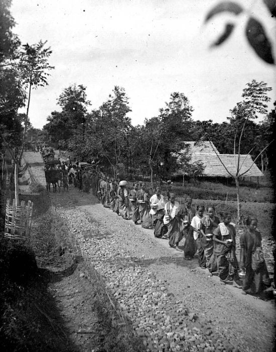 Negatief. Vrouwen wachten langs de weg tot de vorst (datu) van Marioriawa in de draagstoel voorbij komt